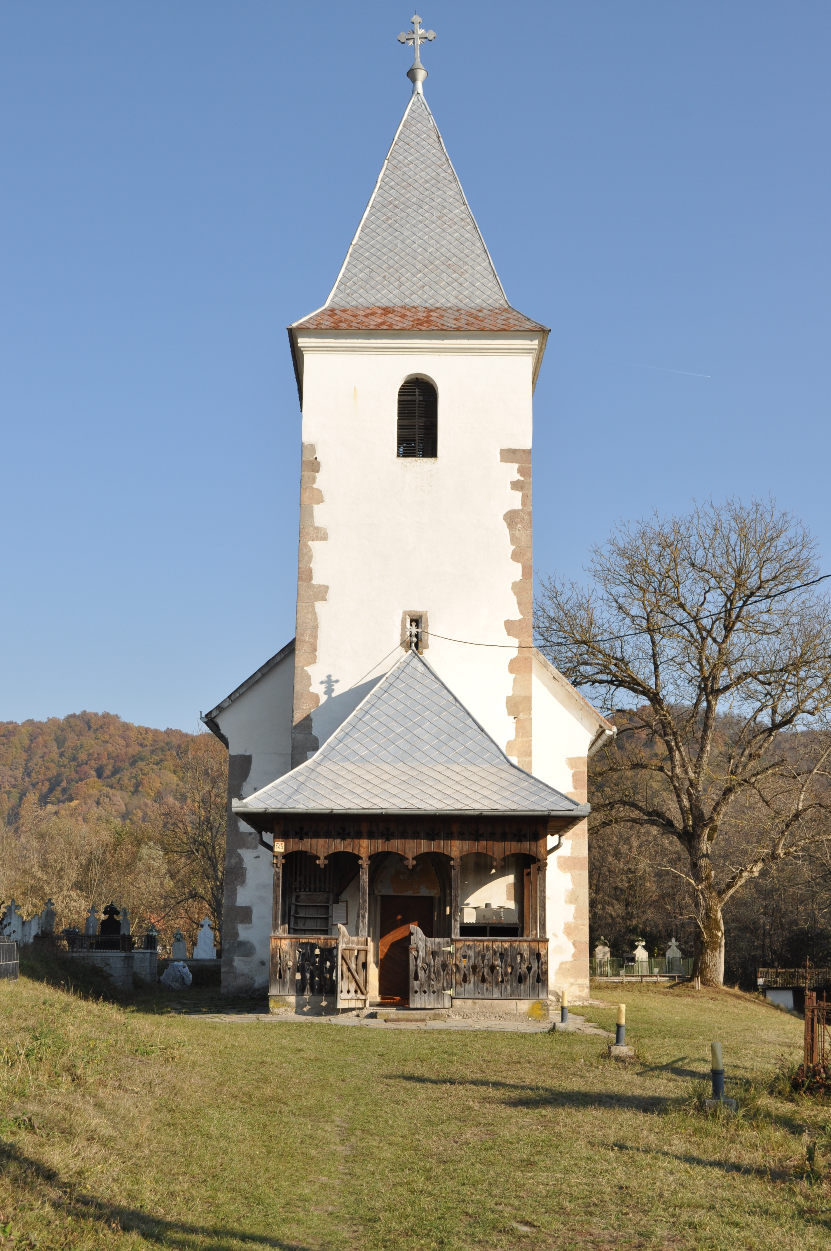 Biserica „Sfântul Ierarh Nicolae" din Ribița, județul Hunedoara